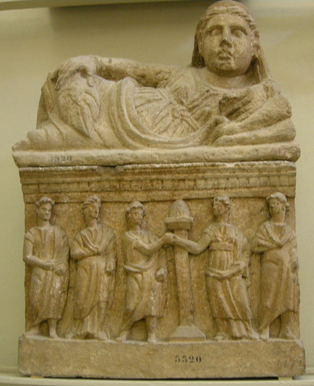 Urnetta cineraria da volterra, II secolo ac. circa